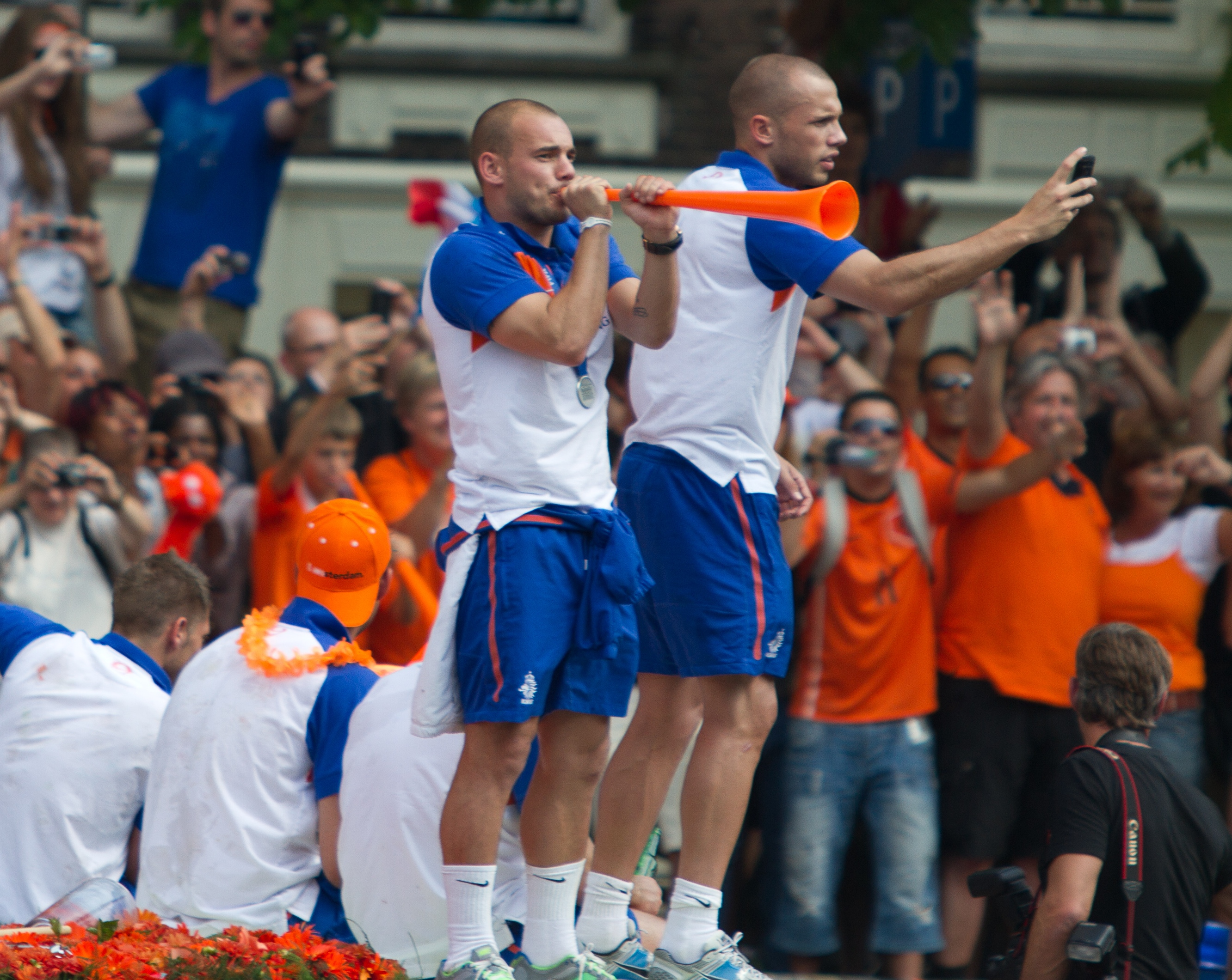 Wesley Sneijder & Johnny Heitinga